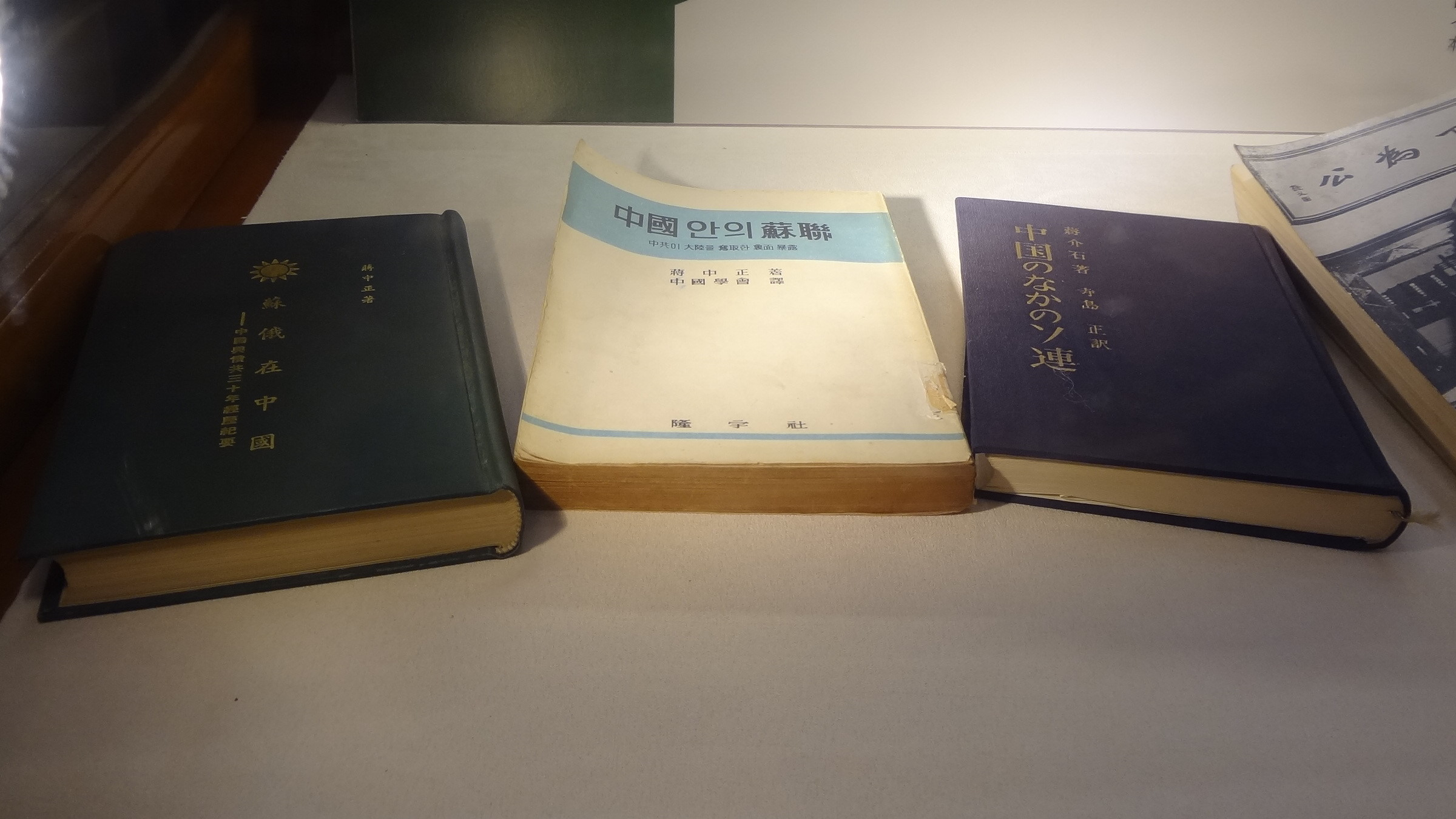 國立中正紀念堂展示的蔣中正著書《蘇俄在中國》的中文版、韓文版與日文版。